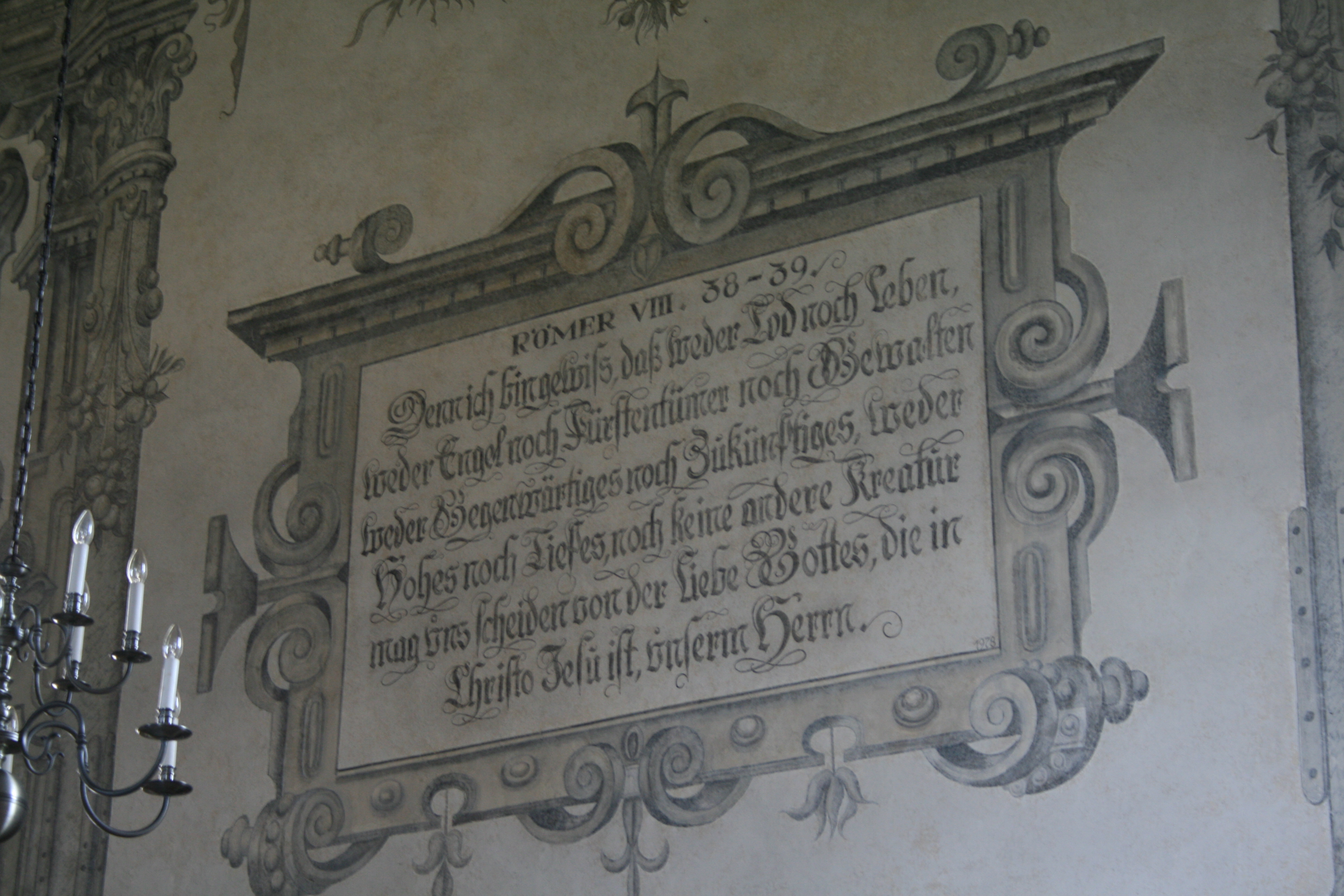 Vers aus Römer 8 in der Kirche Gränichen